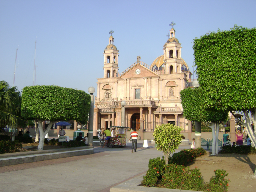 Parroquia de San Francisco de Asís. Ubicada en el parque central del municipio.